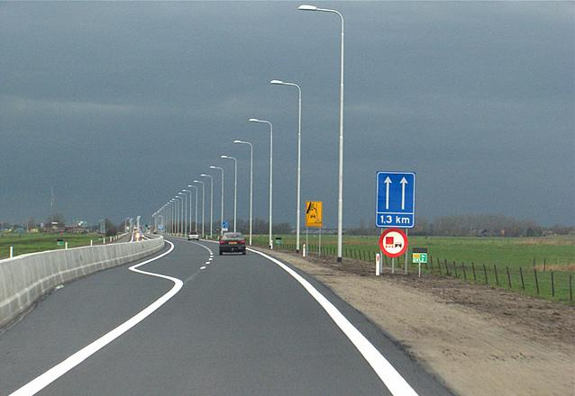 Foto van de N50 tussen Zwolle en Kampen